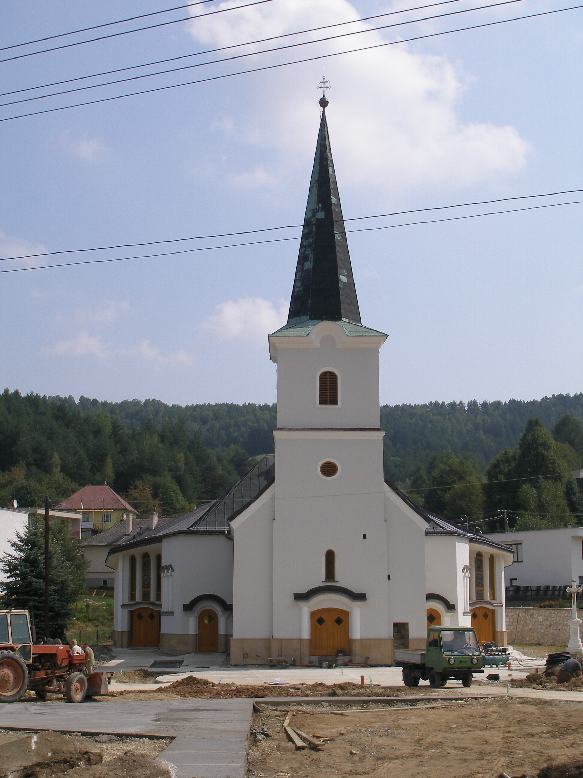 Šarišská obec Široké